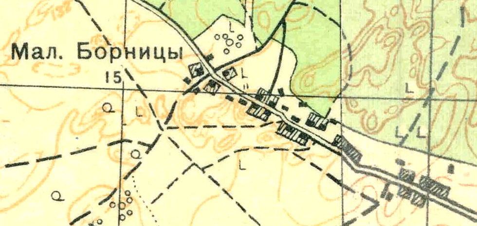 Топографическая карта Ленинградской области, квадрат О-35-24-Б-в (Вохоново), деревня Малые Борницы